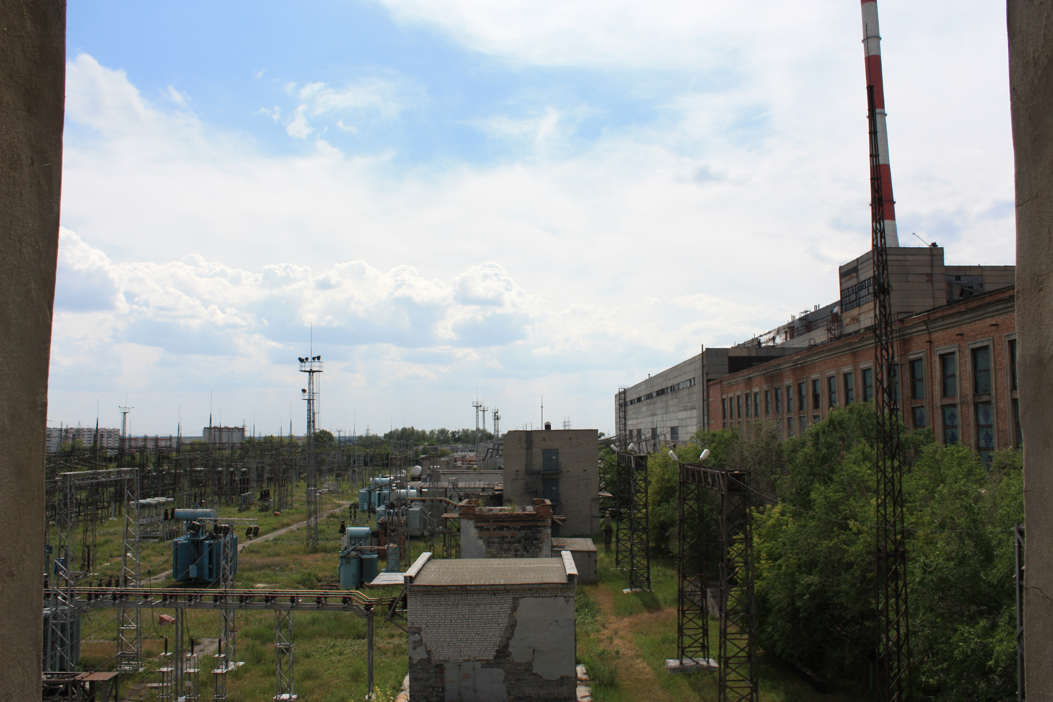 rayon Energetiki, Kurgan, Kurganskaya oblast', Russia, 640008